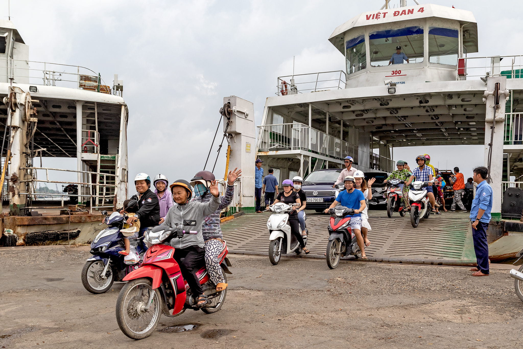 Vào lúc 9 giờ 4 phút sáng ngày 30/6/ 2019, sau khi cầu Vàm Cống thông xe hơn một tháng, “chuyến phà Vàm Cống nối hai bờ sông Hậu cuối cùng” vừa cập bến bờ Long Xuyên (An Giang, Việt Nam), hoàn tất sứ mệnh đưa đón người dân sau gần 100 năm hoạt động.